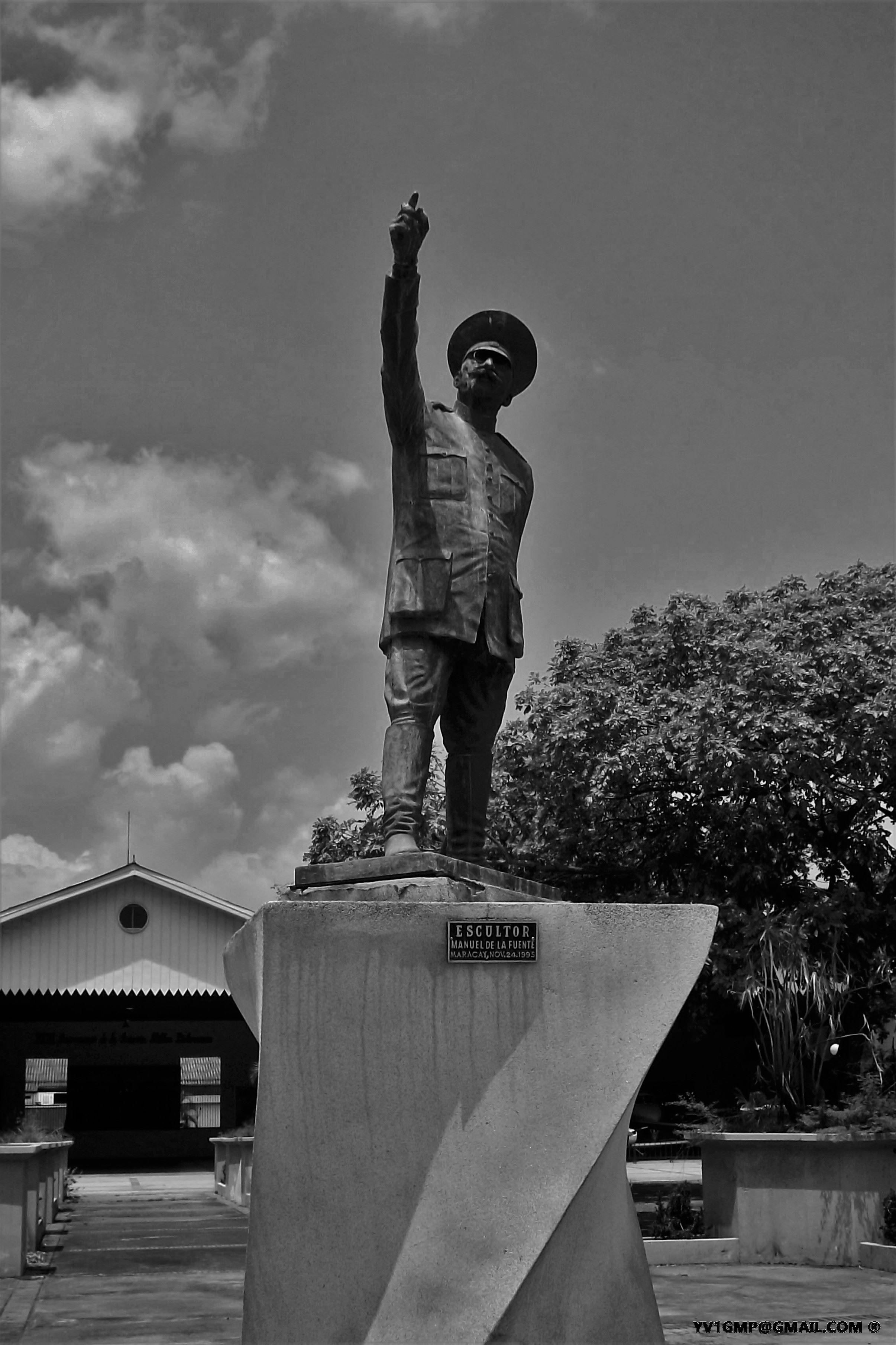 Estatua de Juan Vicente Gómez exhibida en el Museo Aeronáutico Coronel Luis Hernán Paredes